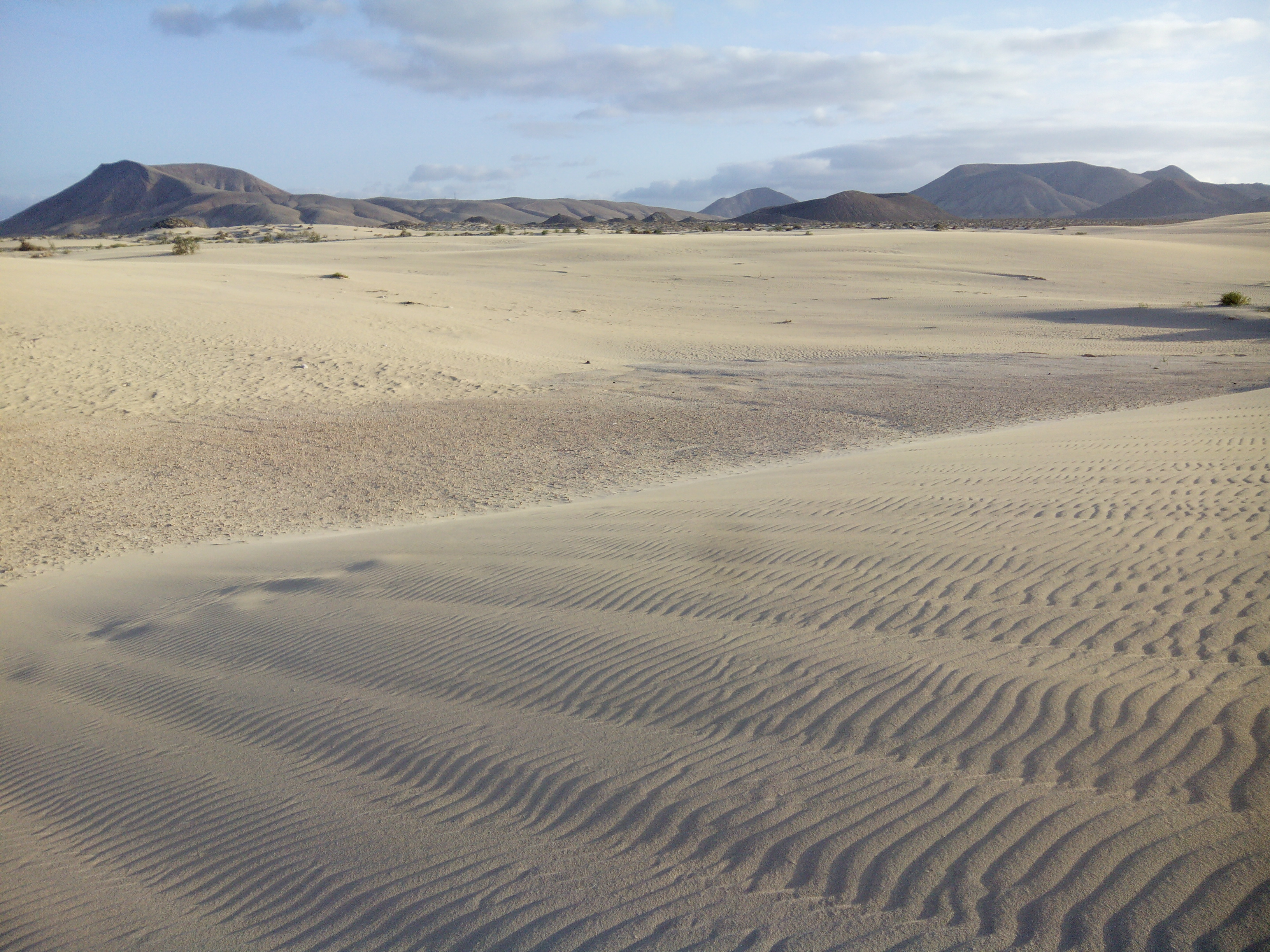 Arena y viento, Dunas de Corralejo.